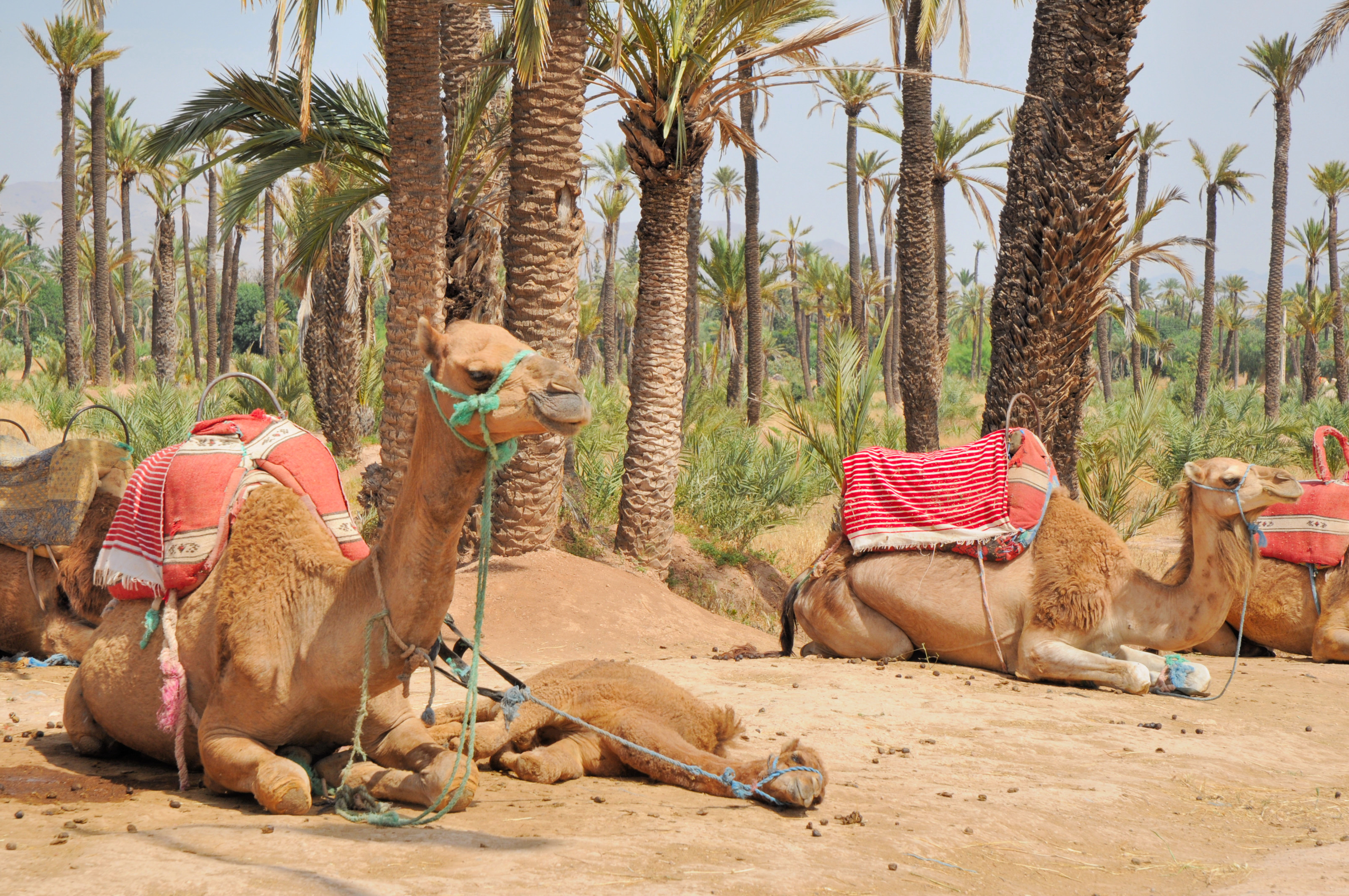 La_Palmeraie_de_Marrakech_707.JPG MAROC